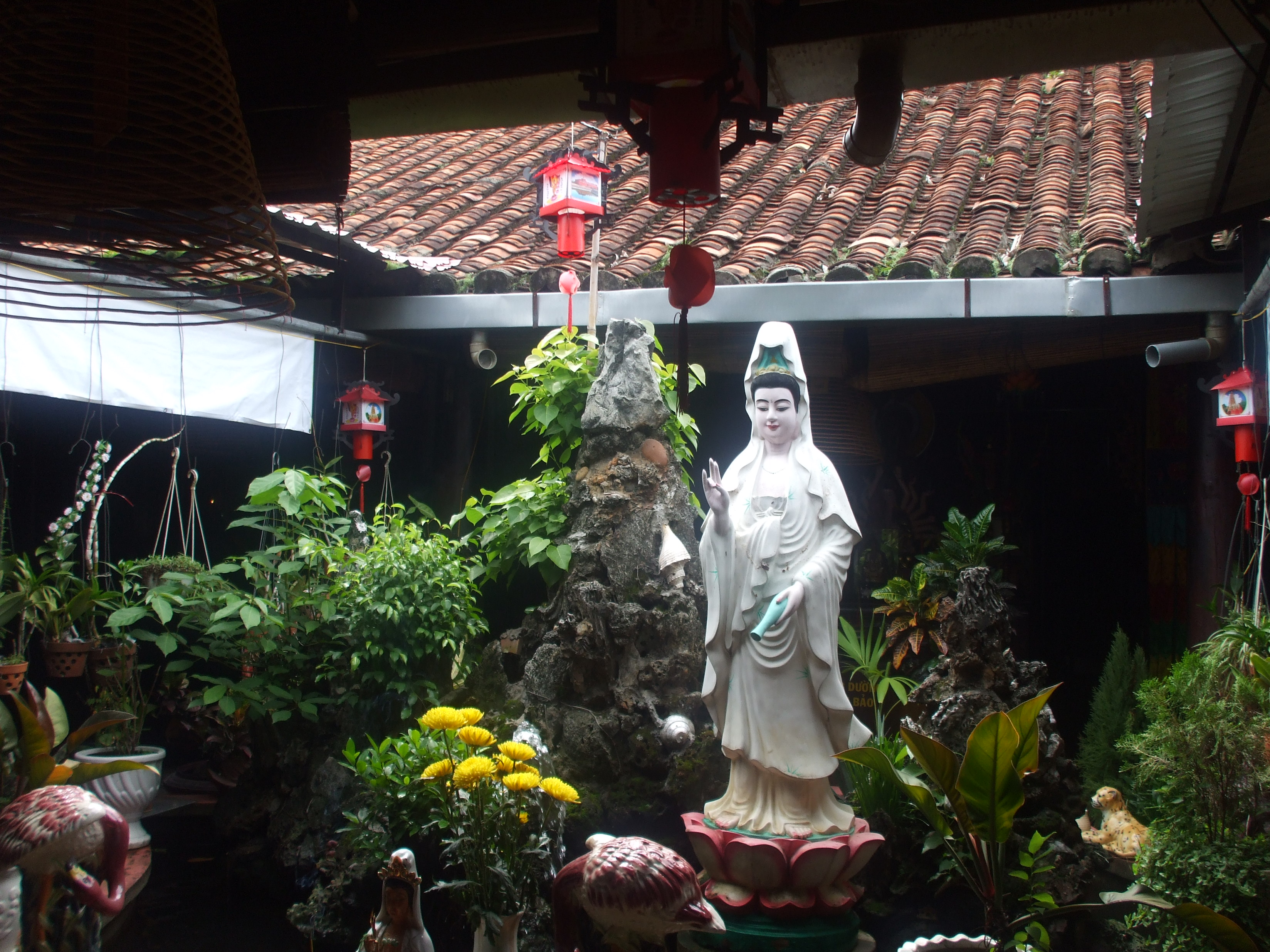 Sân thiên tỉnh ở bên trong chùa Phụng Sơn (TP. Hồ Chí Minh, Việt Nam).